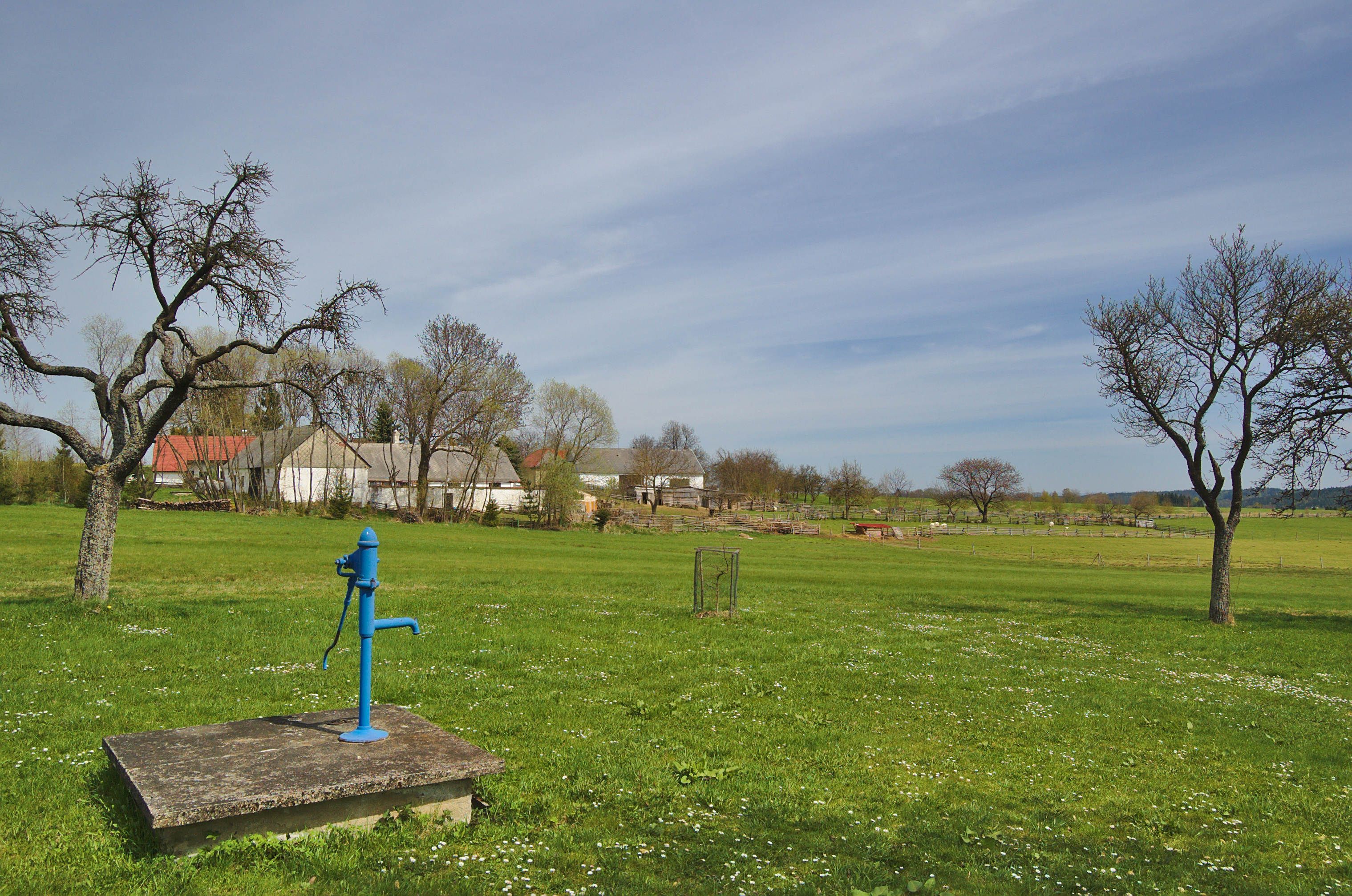 Pohled na osadu od jihu, Bohutín, Lidmaň, okres Pelhřimov Project: Fotíme Česko